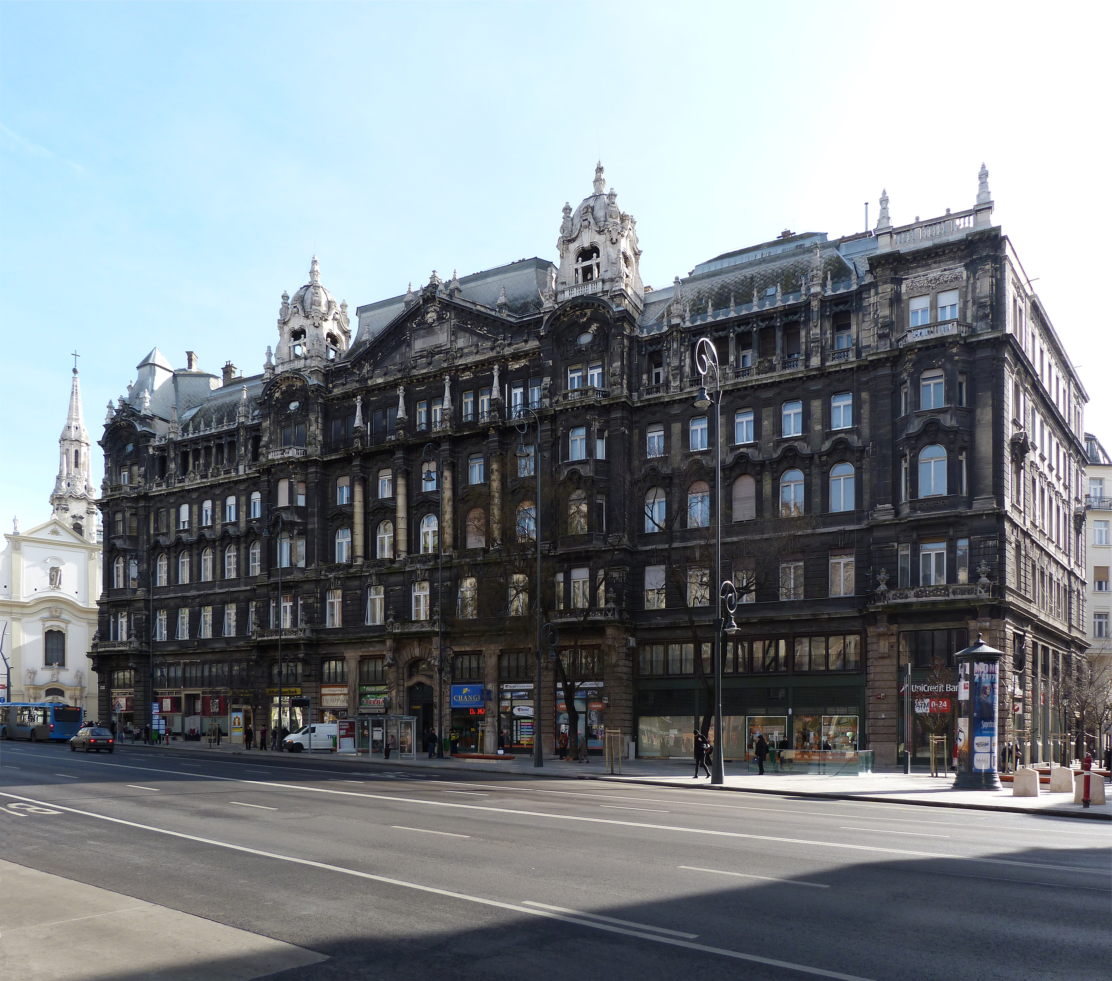 Budapest, a Ferenciek terén. Ferenciek 2 szám, Királyi Bérpaloták.